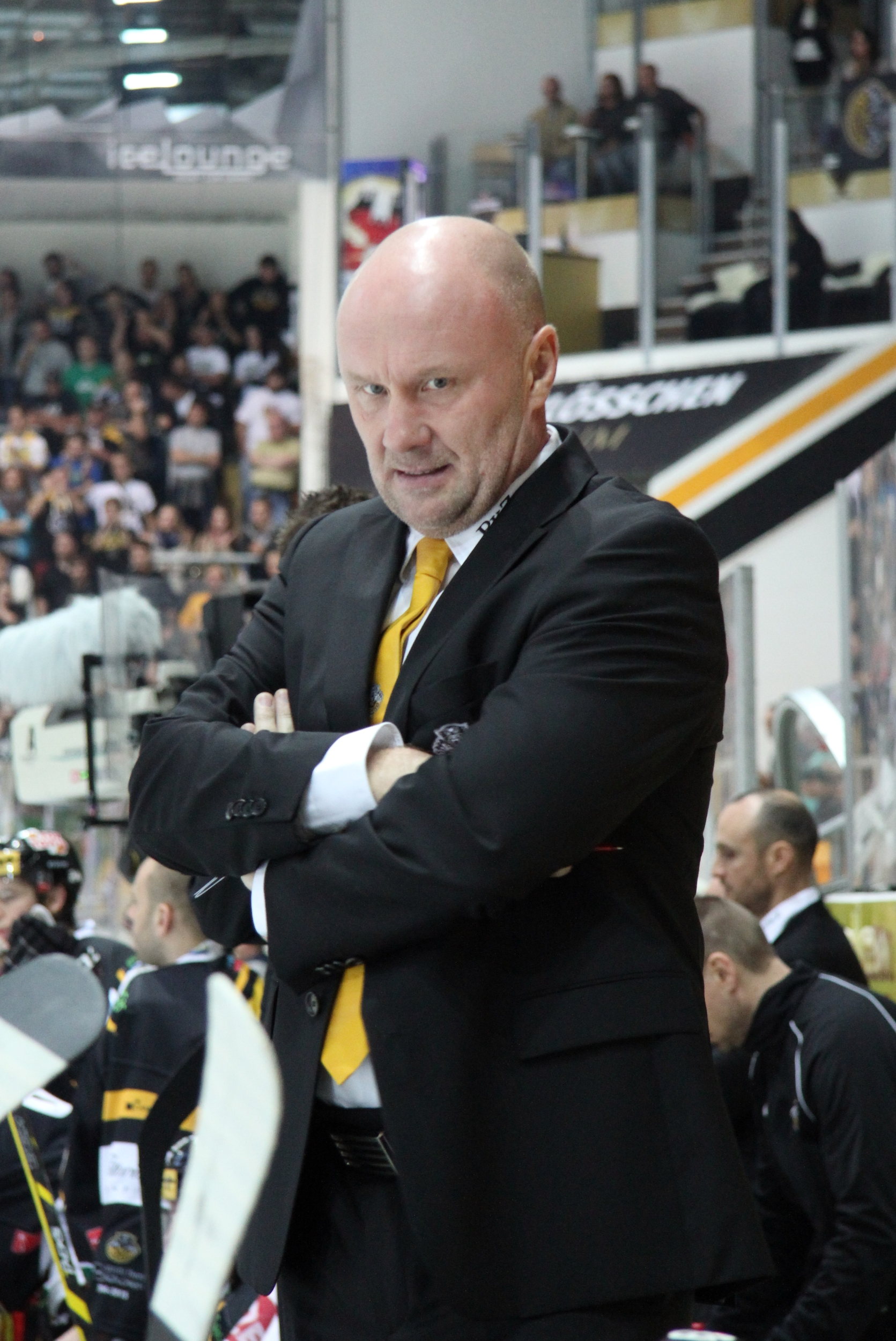 Peter Andersson (L Assistant Coach).